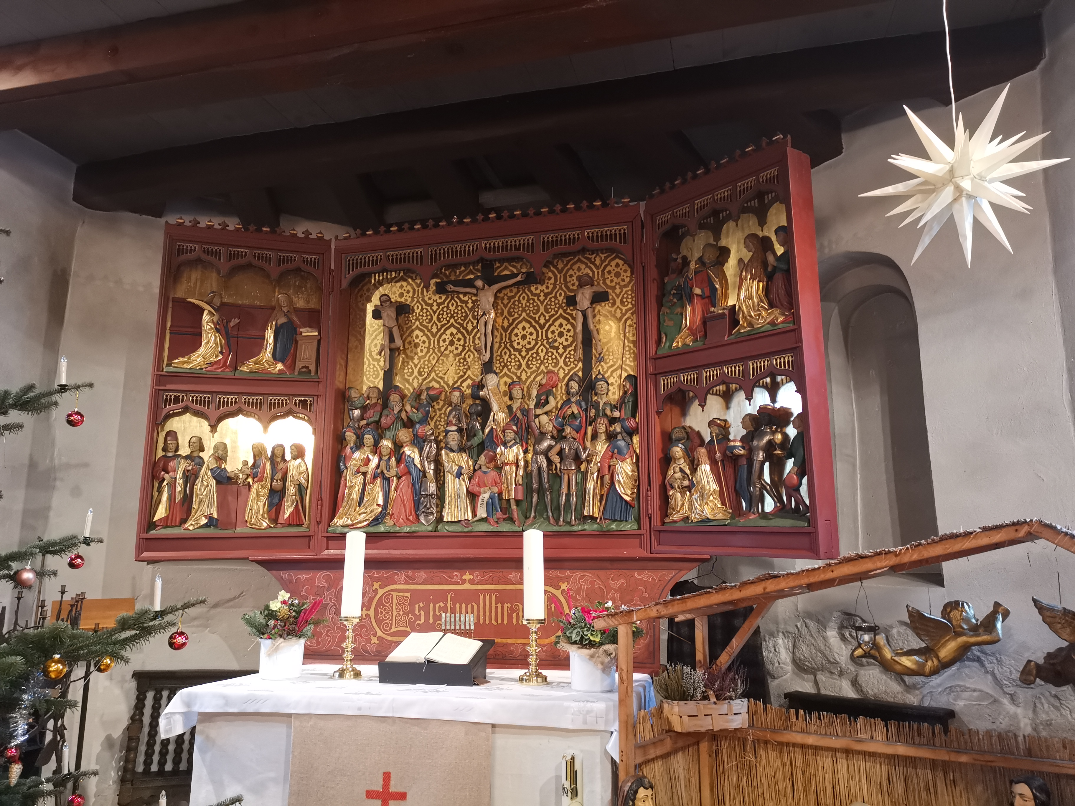 Innenansicht Kirche Süderhastedt